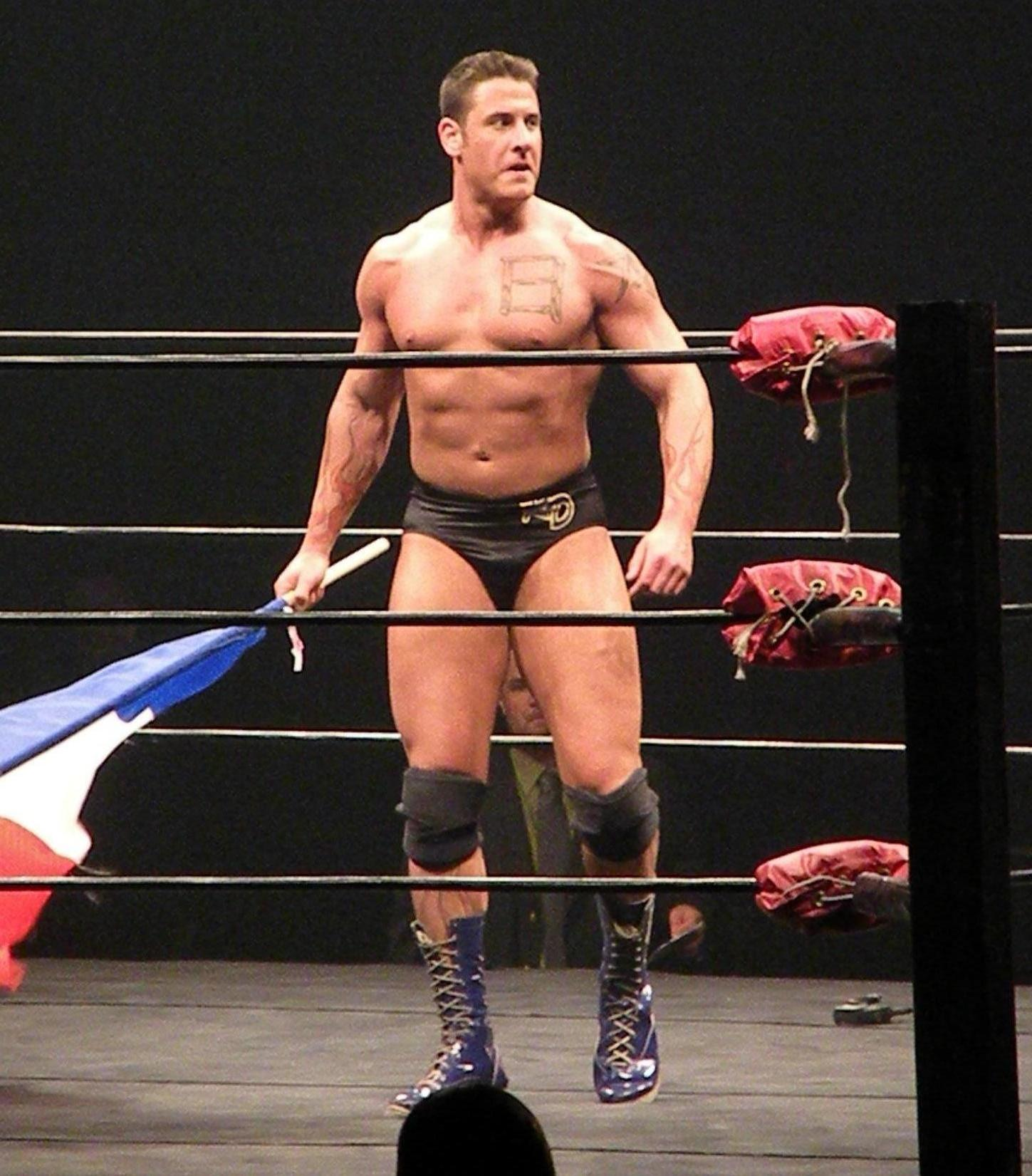 rene dupree catcheur american wrestling rampage 2009 paris